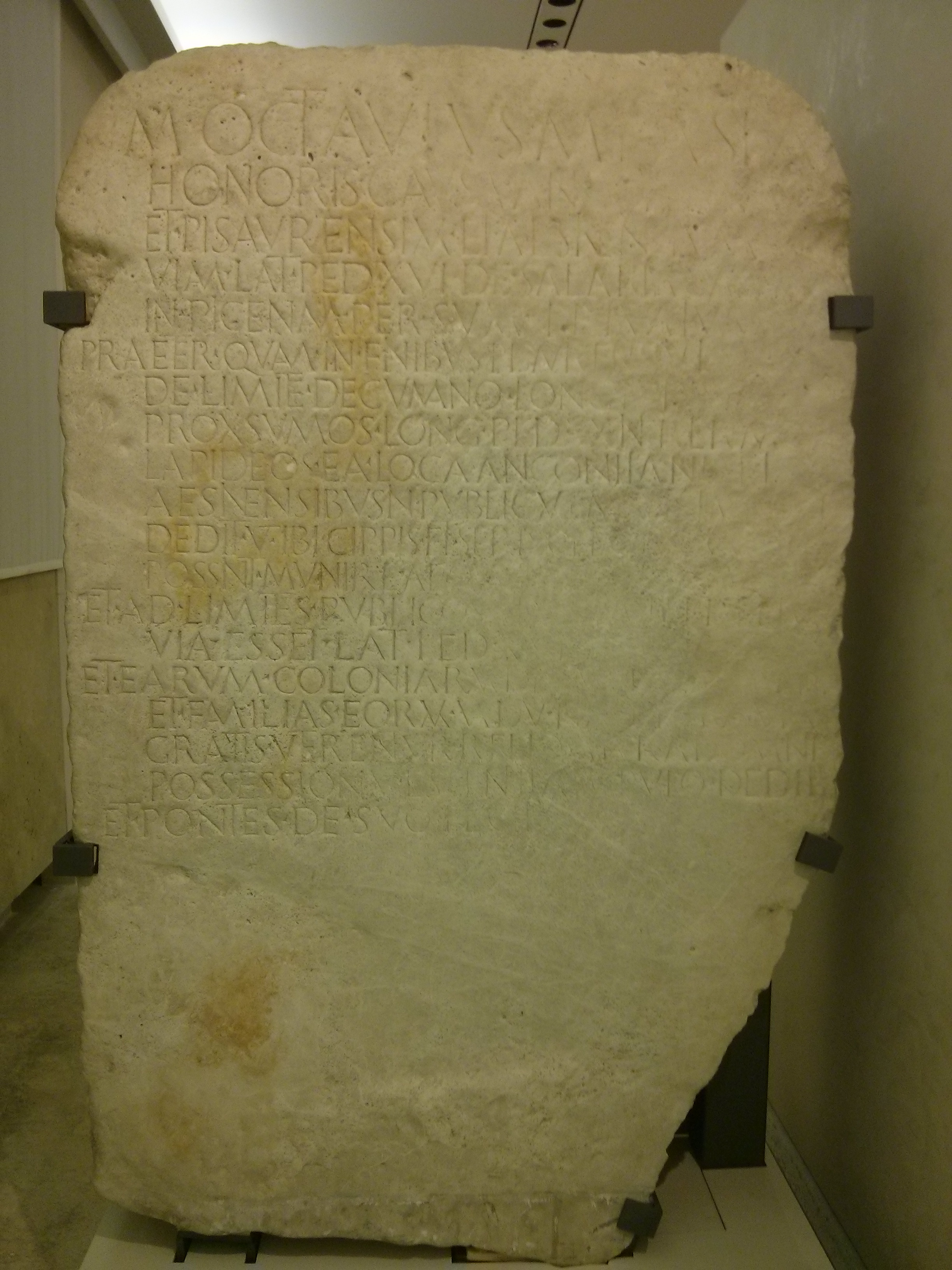 Museo Archeologico Nazionale delle Marche - MIBAC. AE 1990, 0328 = EDR 081844 : M(arcus) Octavius M(arci) f(ilius) Asia[t(icus)] / honoris causa An[c]on[itanor(um)] / et Pisaurensium et Aesinen[s]ium / viam lat(am) ped(es) XVI de Salaria Galli[ca] / in Picenam per suum privatum / praeter quam in finibus Pisaurensium in[stituit] / de limite decumano longam ped(es) XX[--- in] / proxs mos long(am) ped(es) XX inter term[in(os)] / lapideos ea loca Anconitani[s] et Aesinensibus in publicum emit [l]im[itavi]t / dedit ut ibi cippis et secis ole(a)g[in(eis) conloc(atis)] / possint munire aequa[tis] l[ocis(?) ---] / et ad limites publicos ad [---] / via esset lat(a) ped(es) XVI [---] / et earum coloniarum de[c]u[r]i[ones IIviri] / et familias eorum vadu nave [---] / gratis uterentur reliqua iura domini / possessionum essent ita populo dedit / et pontes de suo fecit This is a photo of a monument which is part of cultural heritage of Italy.